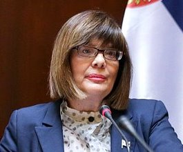 Майя Гойкович (серб. Maja Gojković, Маја Гојковић; род.1963) — сербский политический деятель